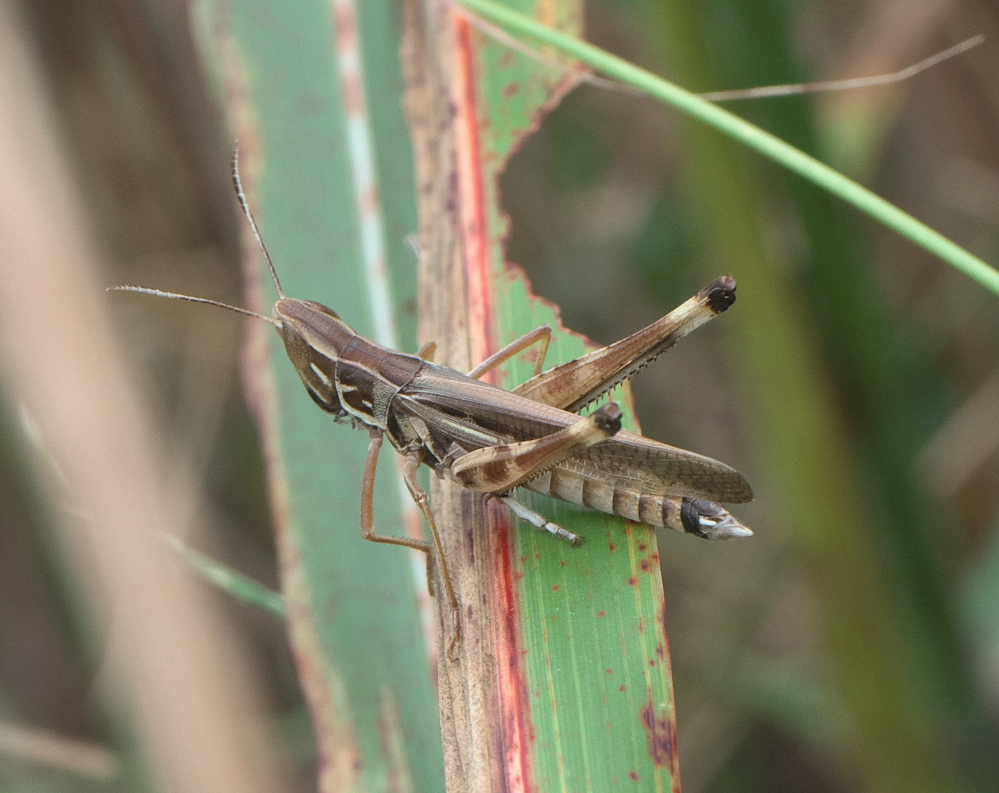 Syrbula admirabilis, Admirable Grasshopper, ID Confidence: 88